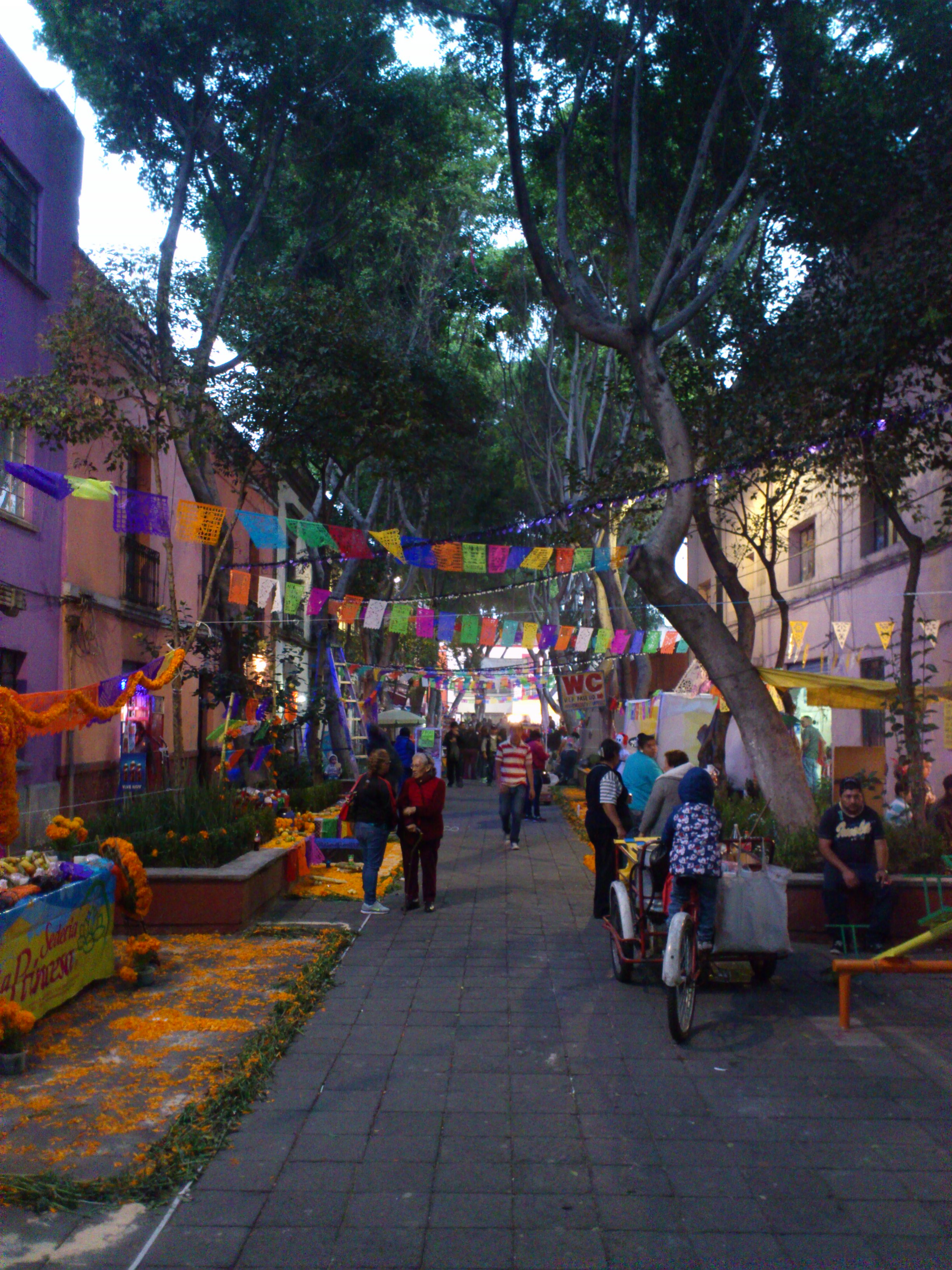 Calle Mariana R. del Toro de Lazarín durante los festejos de día de muertos en el barrio de la Lagunilla